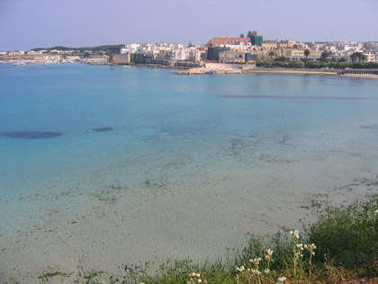 Costa di Otranto, Italia